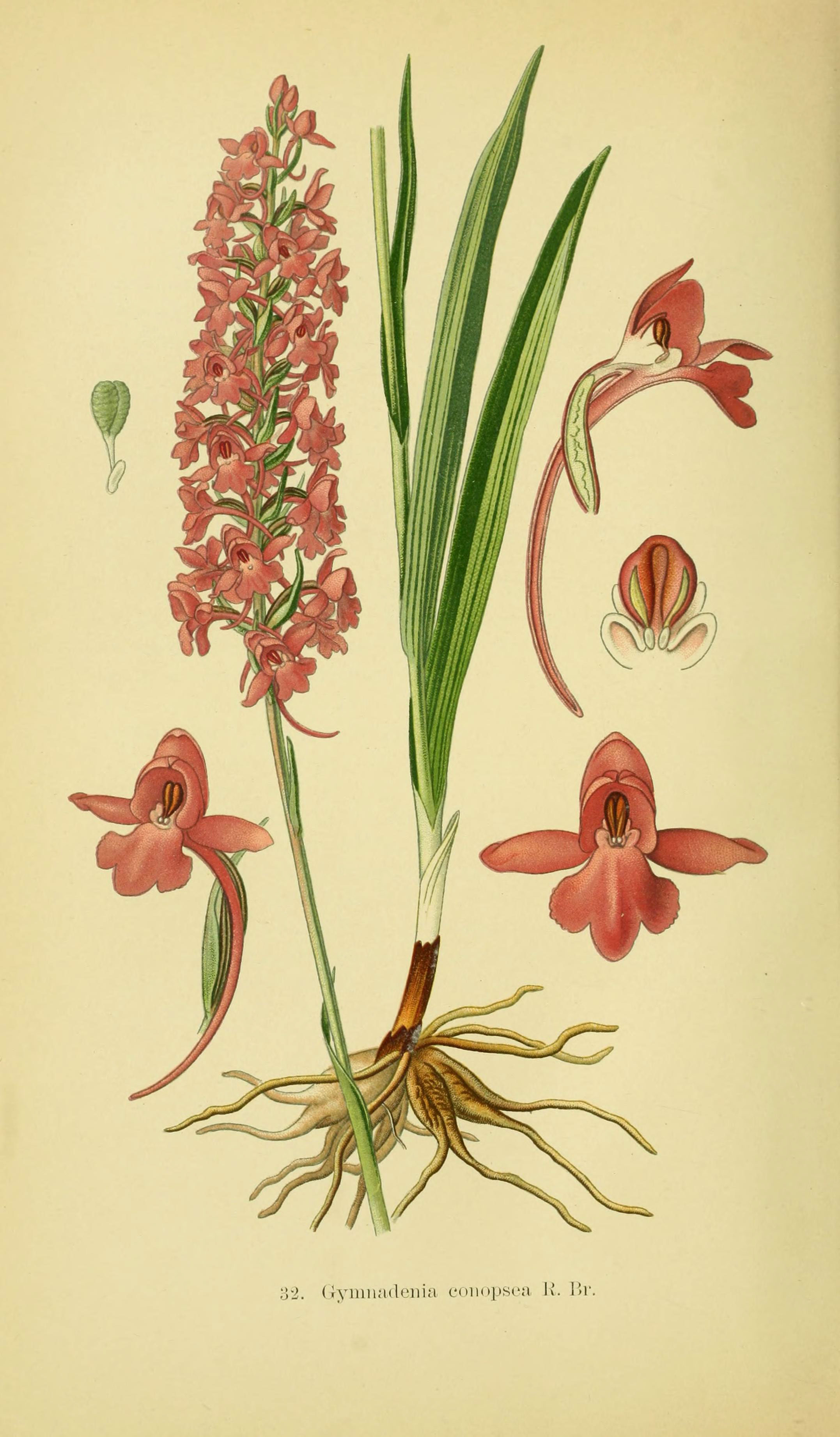 !2. Gymnadenia eonopsea Li. Br